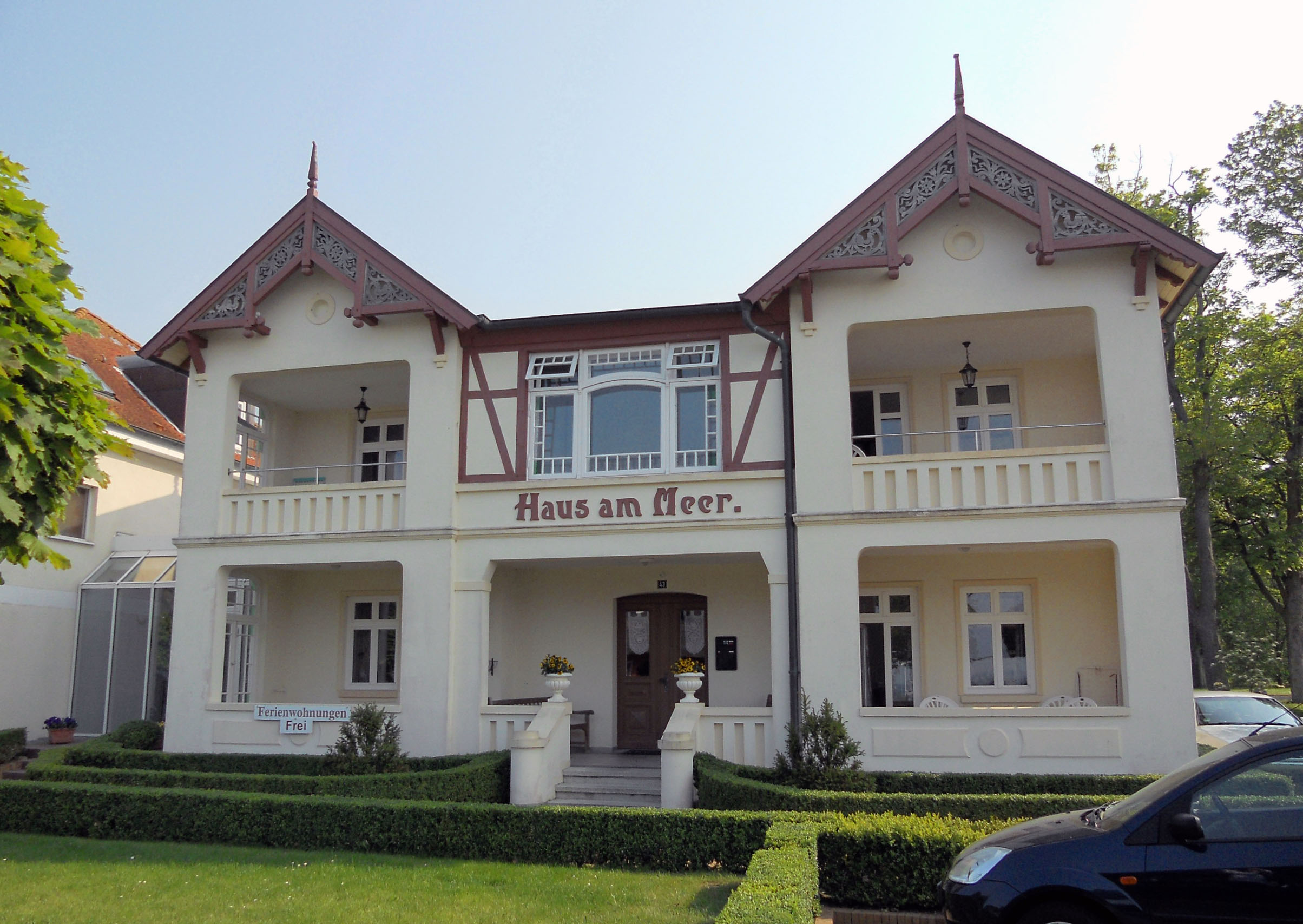 Kühlungsborn, Haus am Meer, Ostseeallee 43